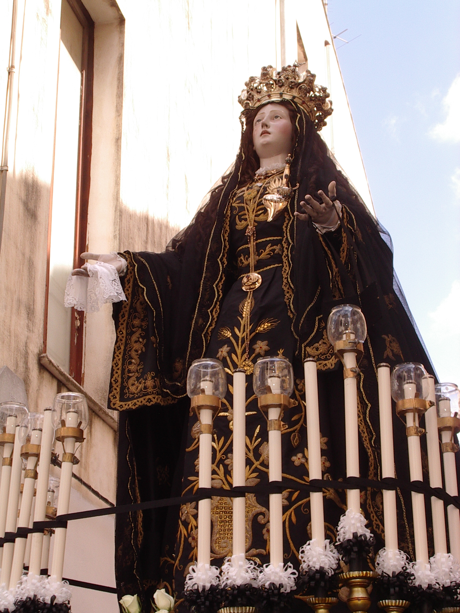 L'Addolarata venerata a Gallipoli